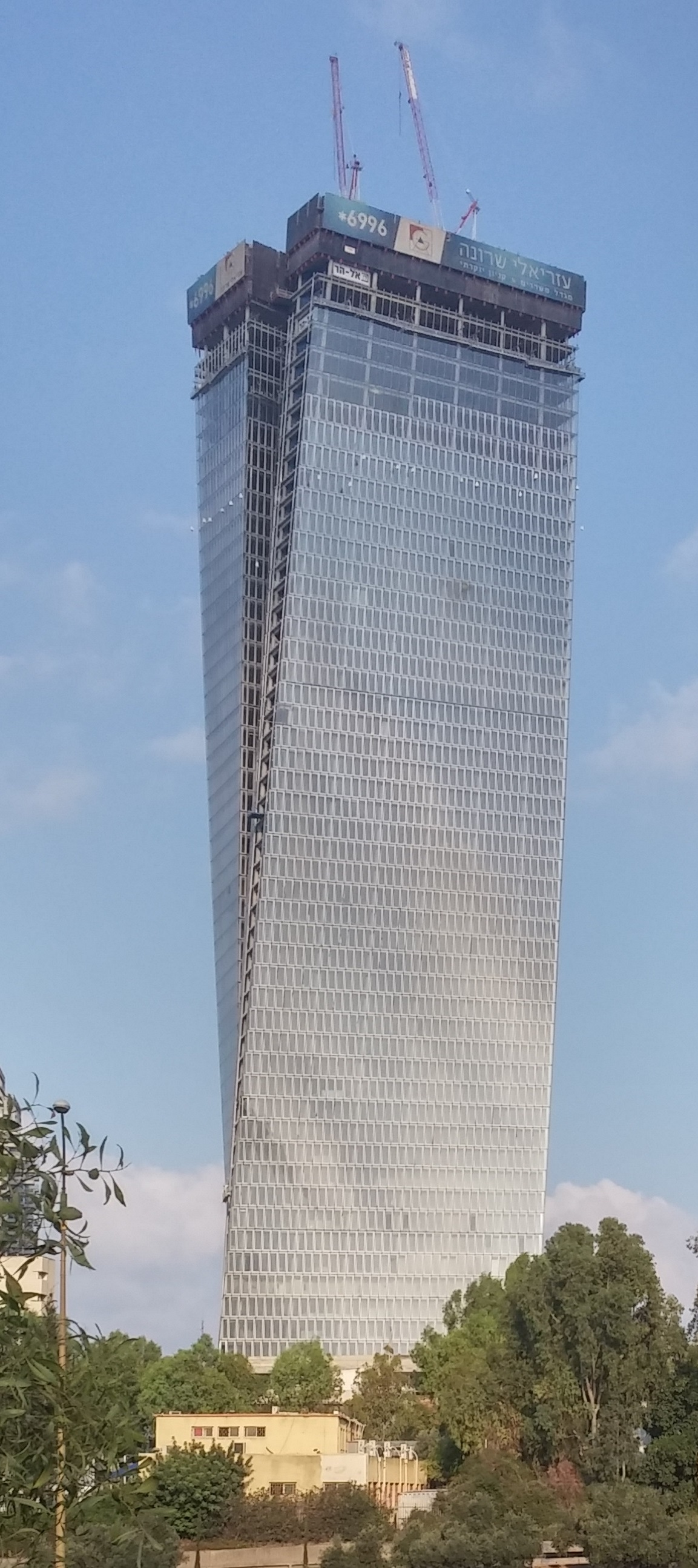 עזריאלי שרונה, ספטמבר 2016